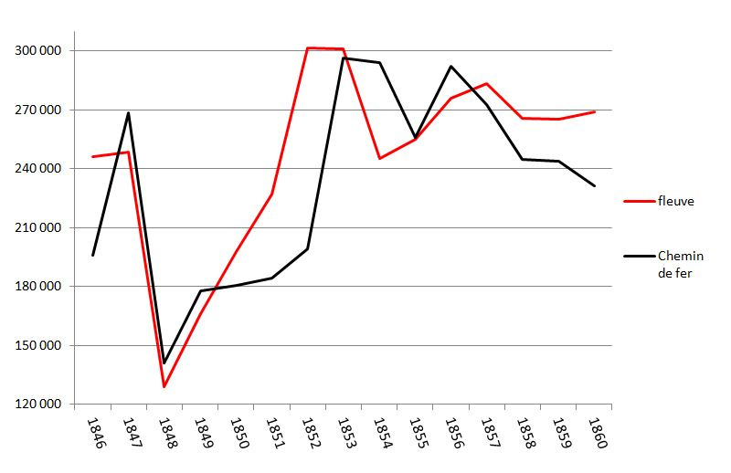 Transport de marchandises (tonnes) de Rouen à Paris (1846 à 1860)